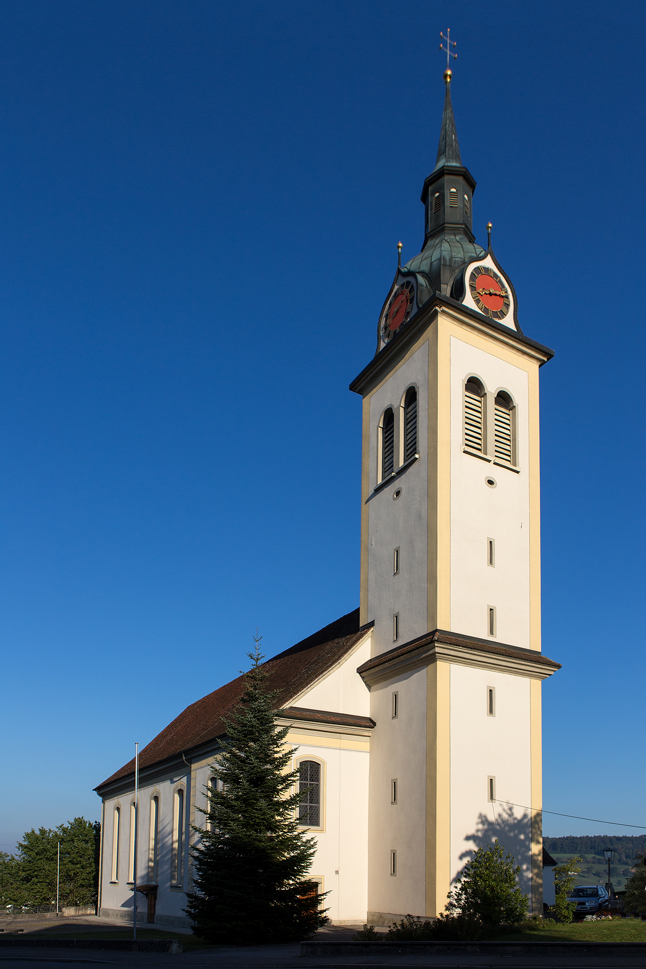 Pfarrkirche Heilig Kreuz in Sarmenstorf